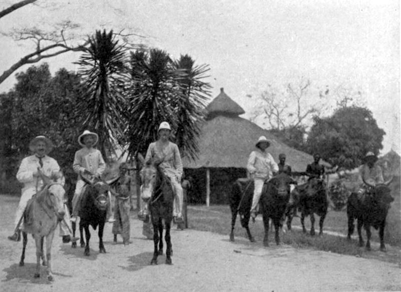 Various Mounts, Lusambo (Lualaba-Kassai) - p. 200